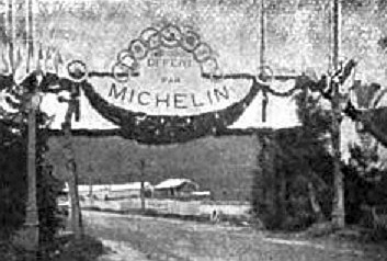 La passerelle Michelin - Coupe Gordon Bennett et éliminatoires françaises, 1905 (circuit d'Auvergne, dit Michelin) Histoire de l'automobile, Pierre Souvestre, éd. H. Dunod et E. Pinat, 1907 (ASIN B001BPBE58) p.681